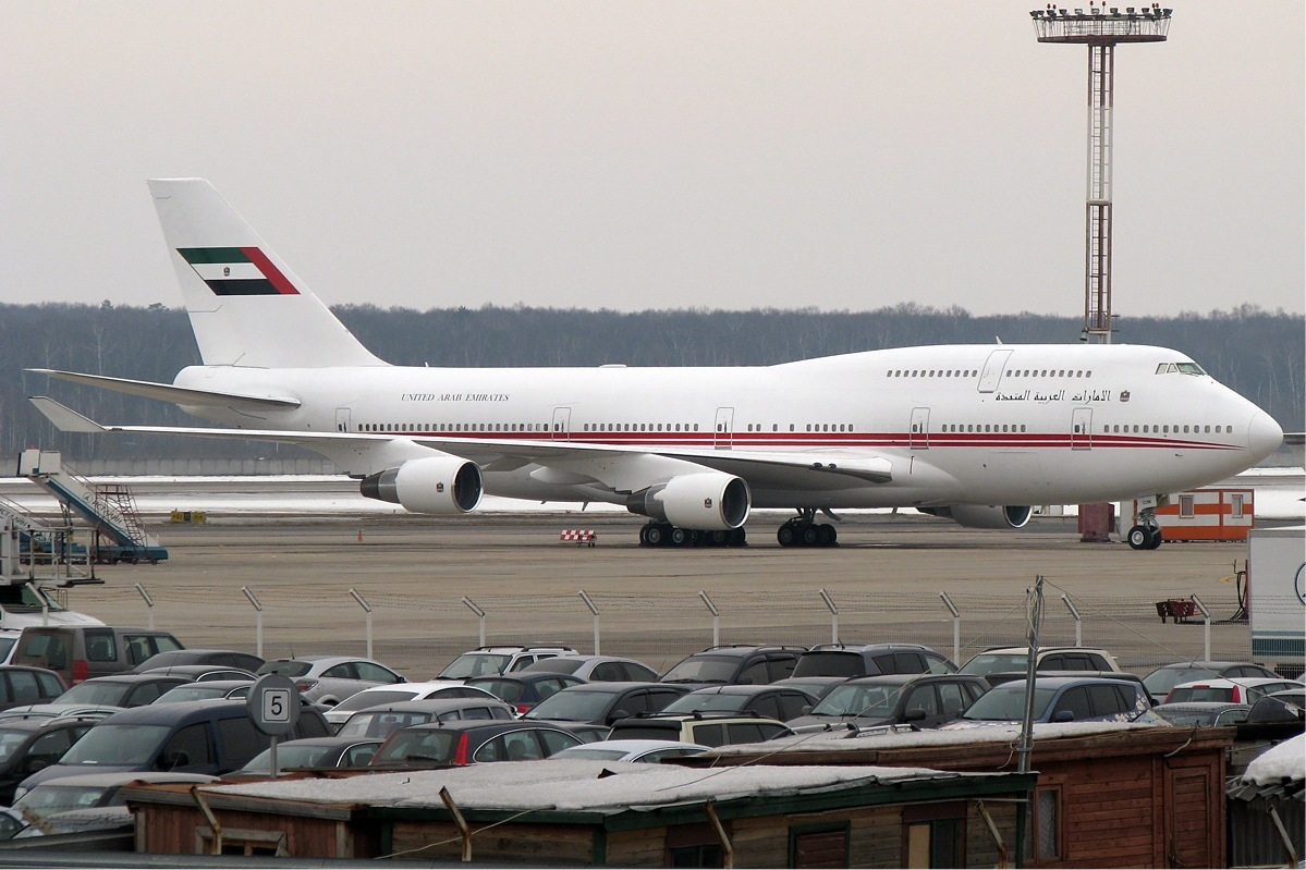 Dubai Air Wing Boeing 747-400